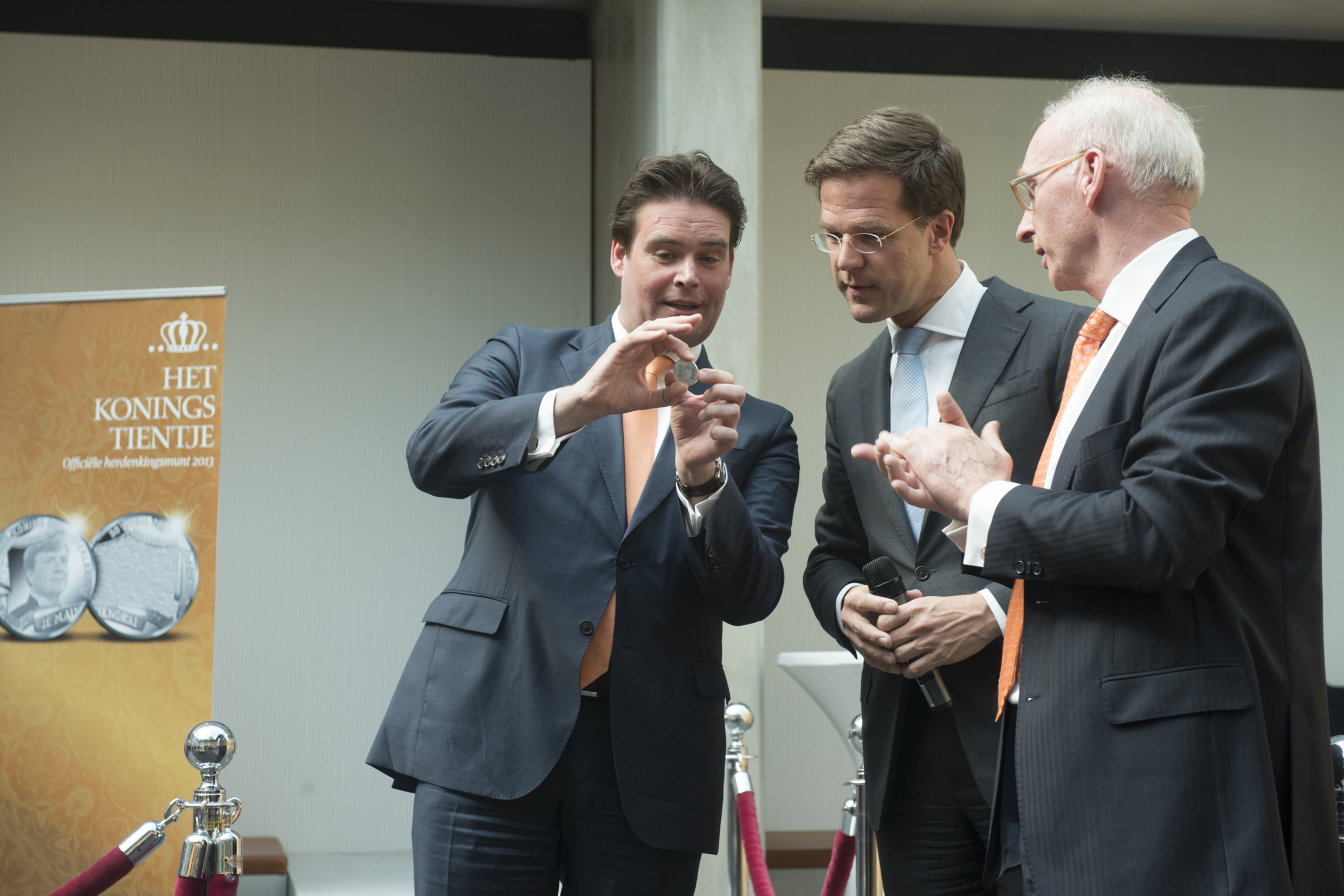 Minister-president Rutte heeft vanmiddag op het ministerie van Financiën de ceremoniële Eerste Slag verricht van het ‘Koningstientje’. Hij deed dit in aanwezigheid van de staatssecretaris Weekers van Financiën en Muntmeester Maarten Brouwer van de Koninklijke Nederlandse Munt. Het ‘Koningstientje’ is de eerste munt waarop Willem-Alexander als Koning is afgebeeld. De herdenkingsmunt is ontworpen door het duo Broersen en Lukács.